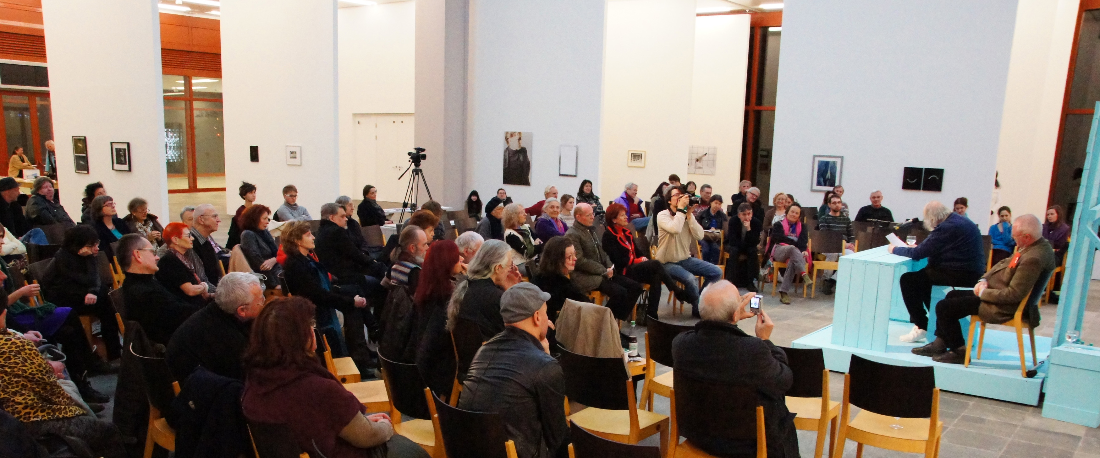 Unter dem Titel "Eine Versammlung kommt selten allein" lasen, anlässlich des 40. Jahrestages der Gründung, Lyriker und Lyrikerinnen der Grazer Autorinnen Autorenversammlung im "Salon für Kunstbuch im 21er Haus". Abgebildete Personen: S. Dateiname.